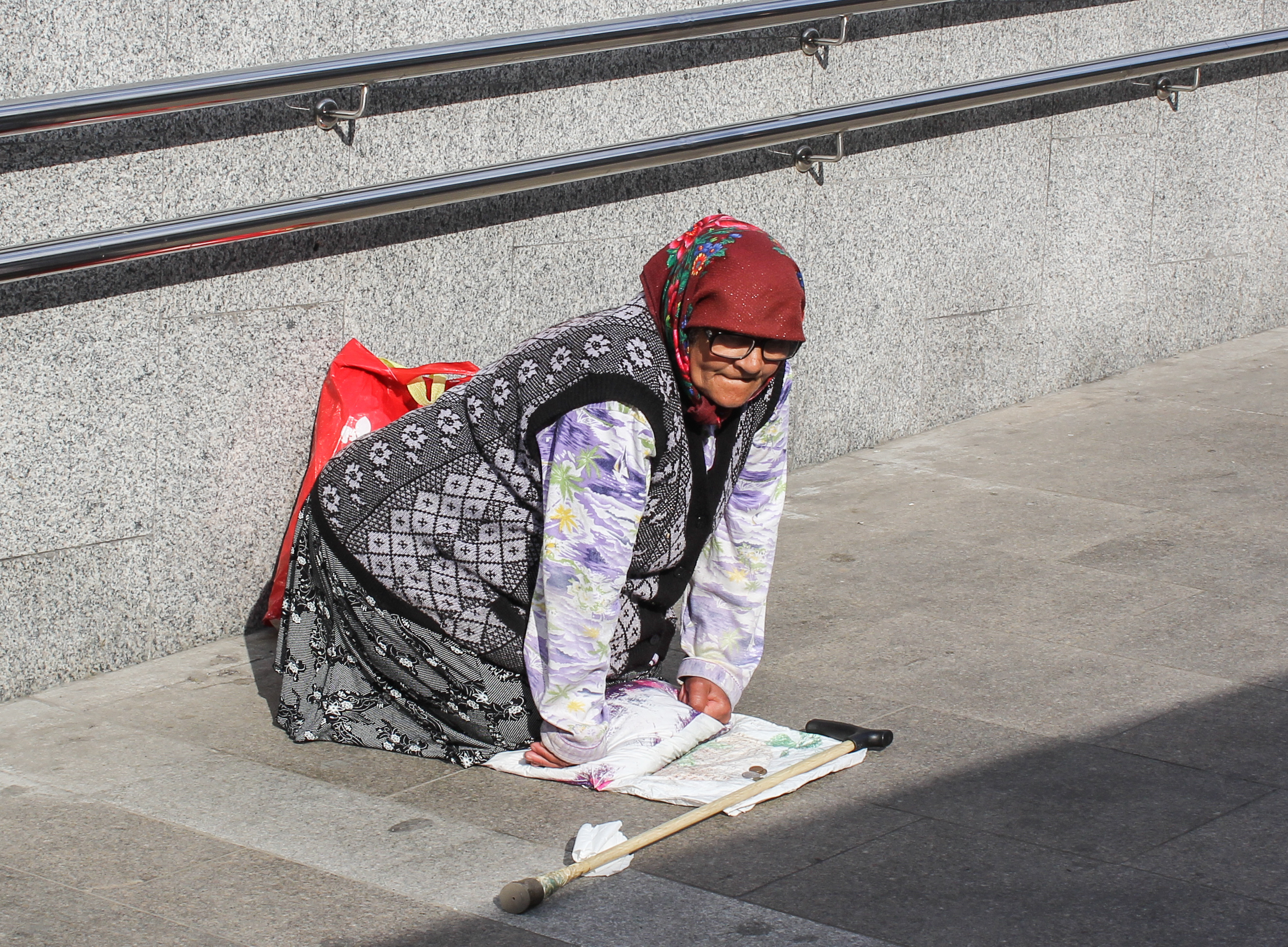 Женщина попрошайка на Павелецком вокзале в Москве